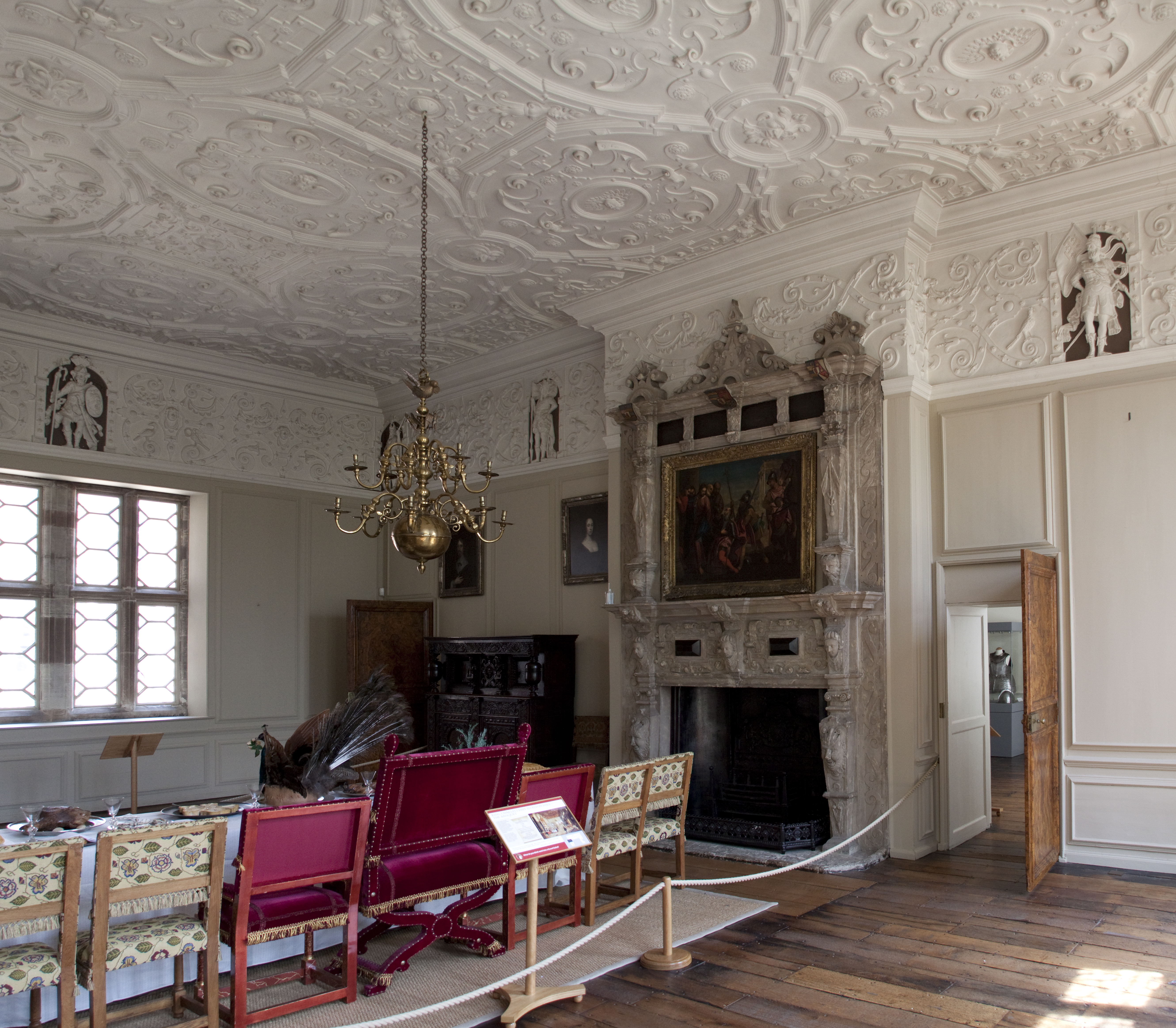 Aston Hall Dining Room